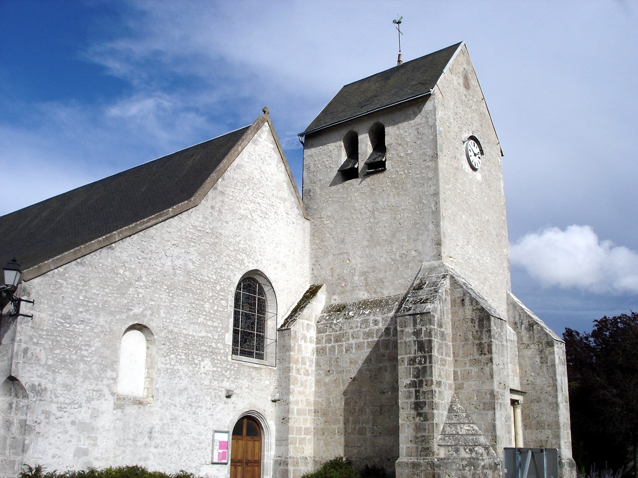 Eglise de Messas - Vue de la place du village